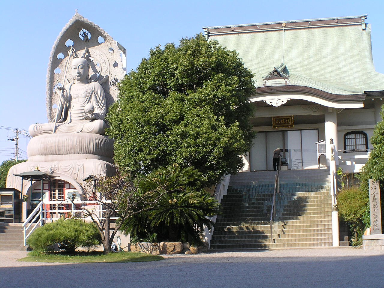 密蔵院（大地蔵）兵庫県明石市